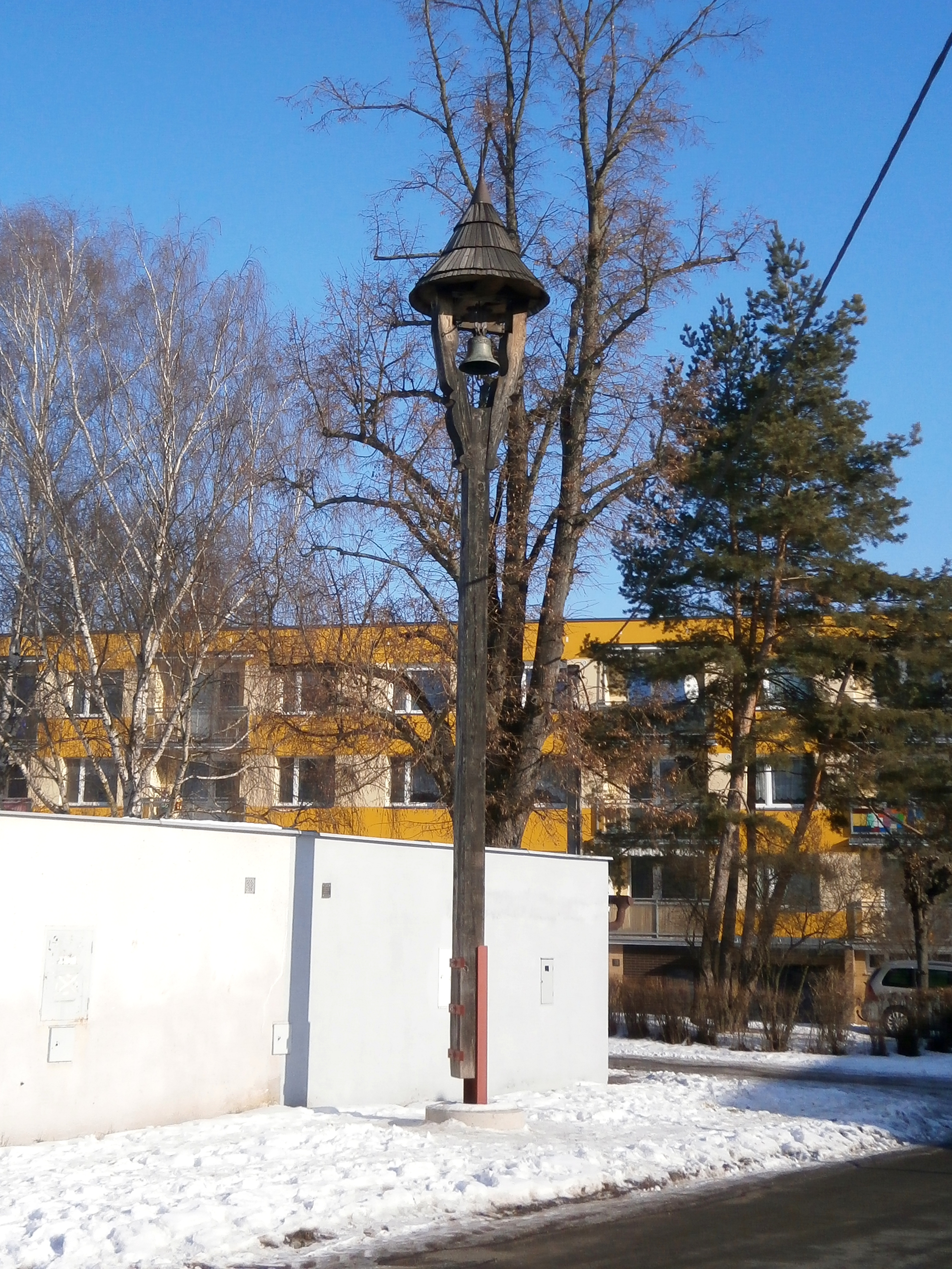 Zvonička ve Farářství (Hradec Králové)